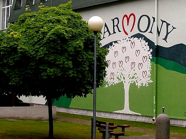 Rehabilitačné centrum Harmony. Bratislava. Slovensko.